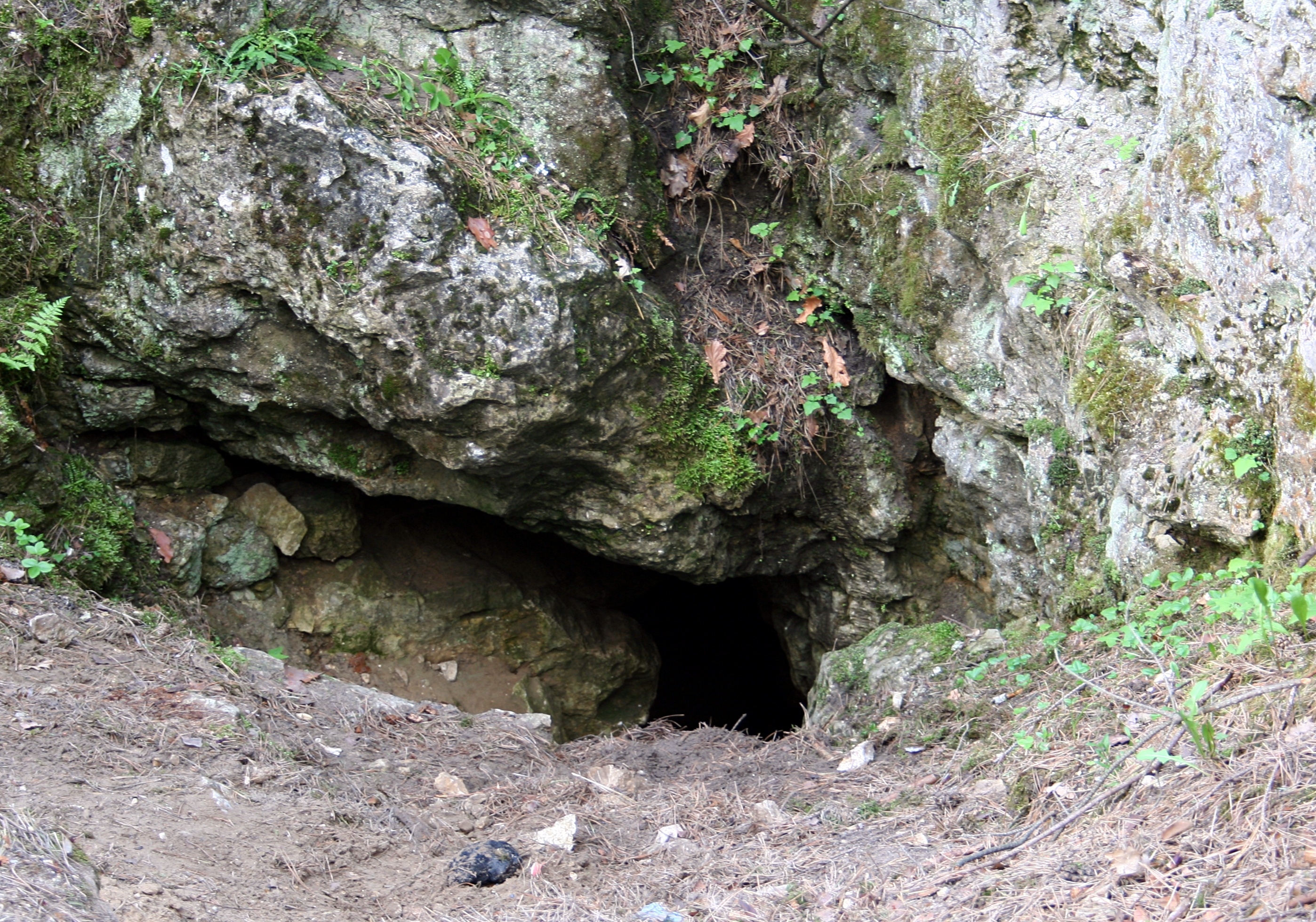 Załęczański PK, Rezerwat Węże, jaskinia Niespodzianka na górze Zelce - wejście